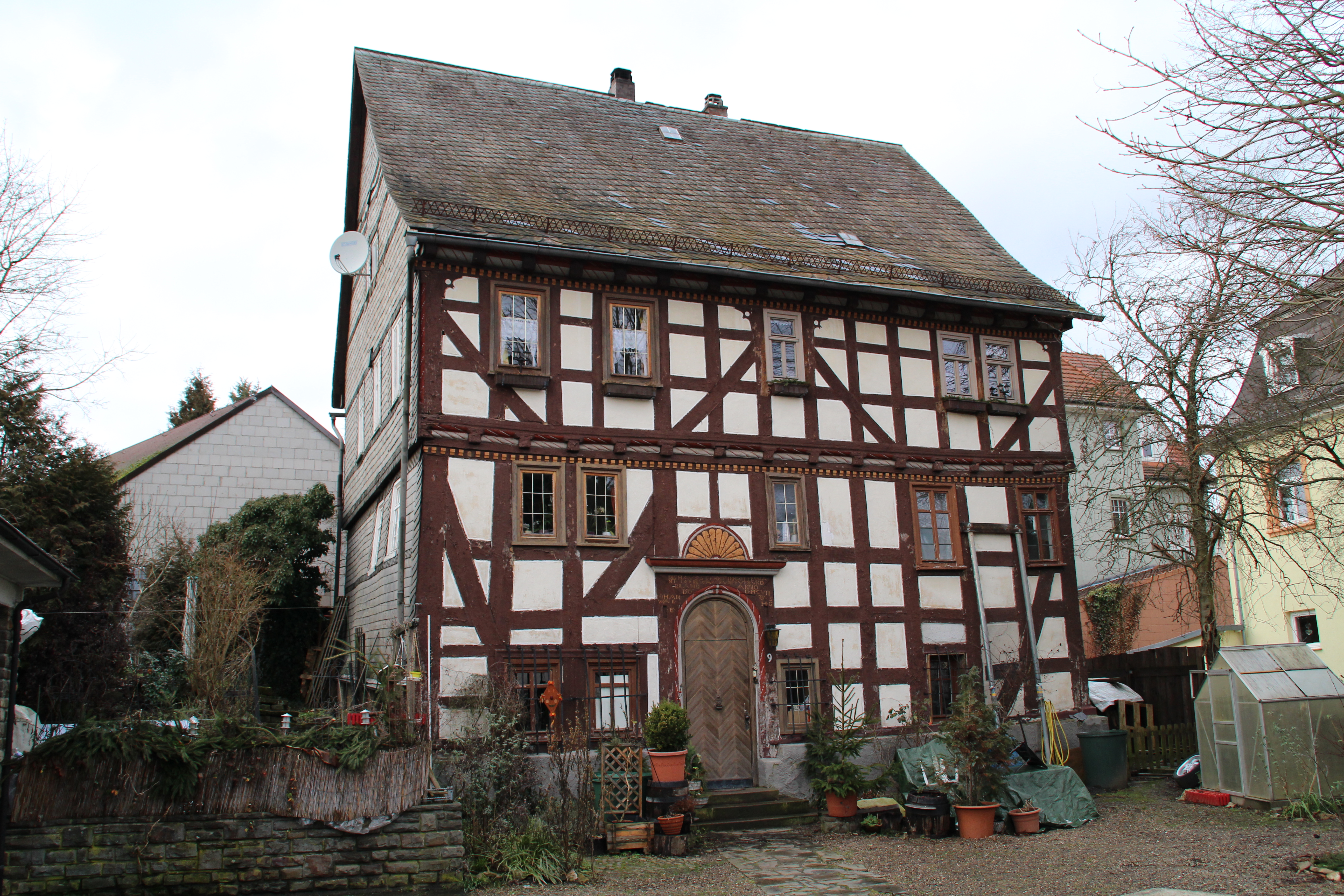 Gladenbach; ehem. Pfarrhaus; ältestes Wohnhaus in Gladenbach; Winteraufnahme - bessere Aufnahem folgt im Sommer